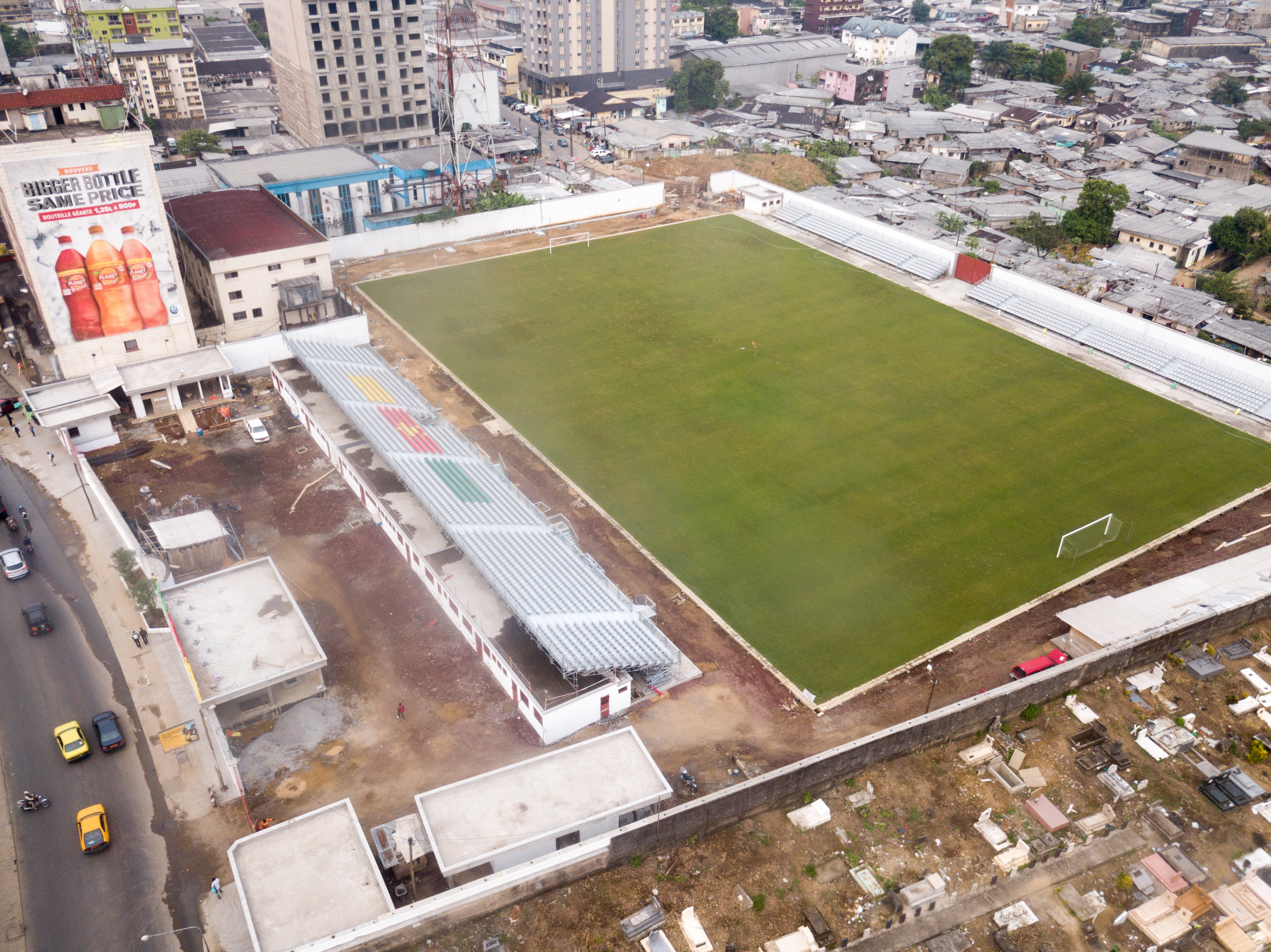 Vue aérienne du stade Mbappé Léppé à Douala (Cameroun).